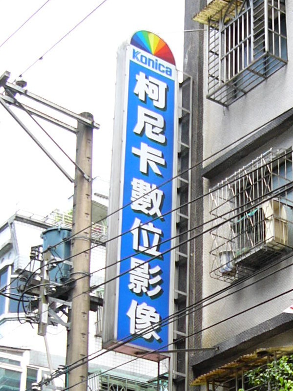 台灣的「柯尼卡數位影像」加盟店招牌格式2